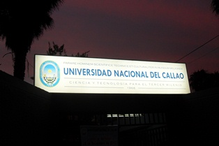 Universidad Nacional del Callao